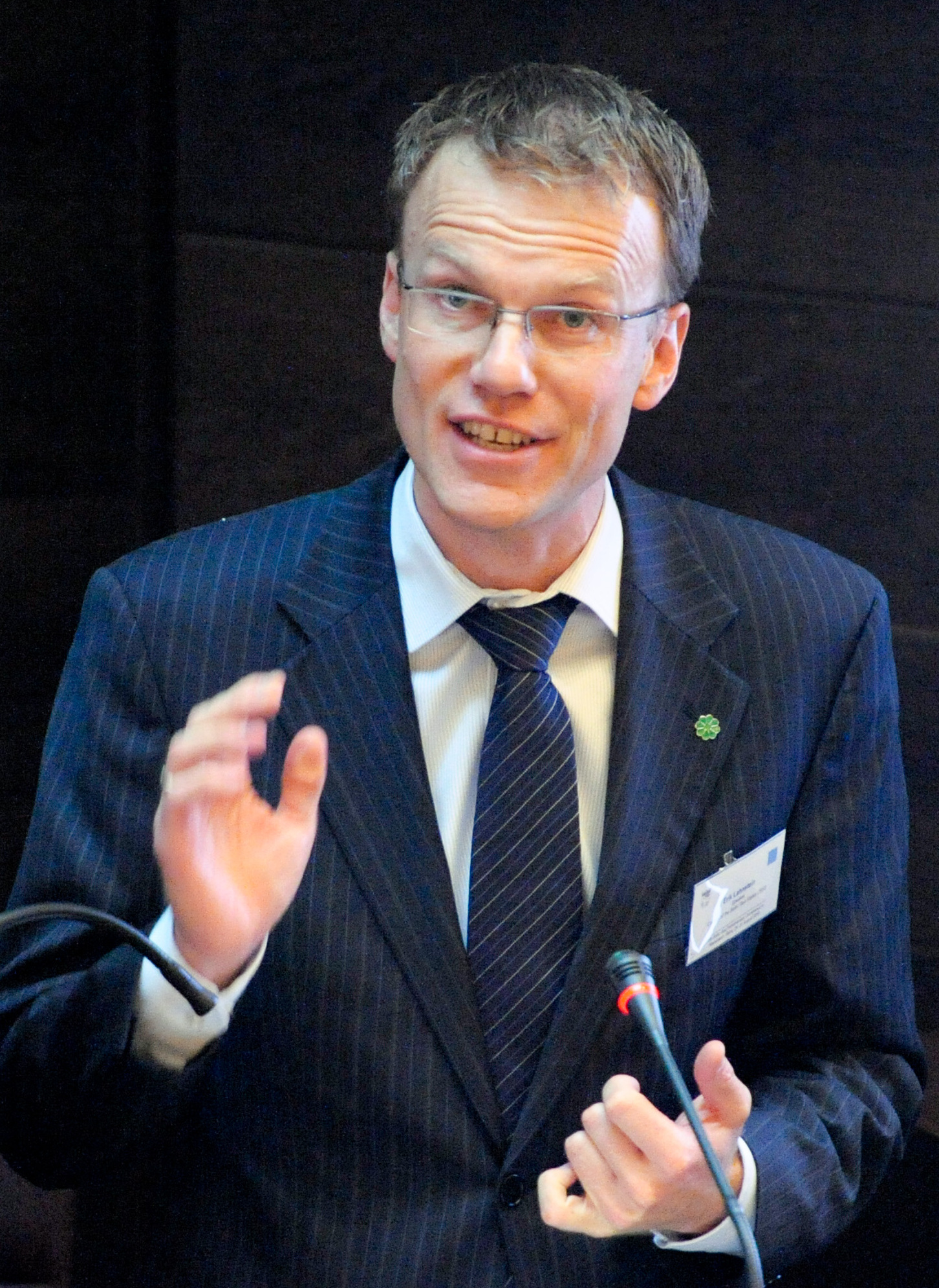 Erik Lahnstein statssekreterare Norge. BSPC 19 Mariehamn Åland